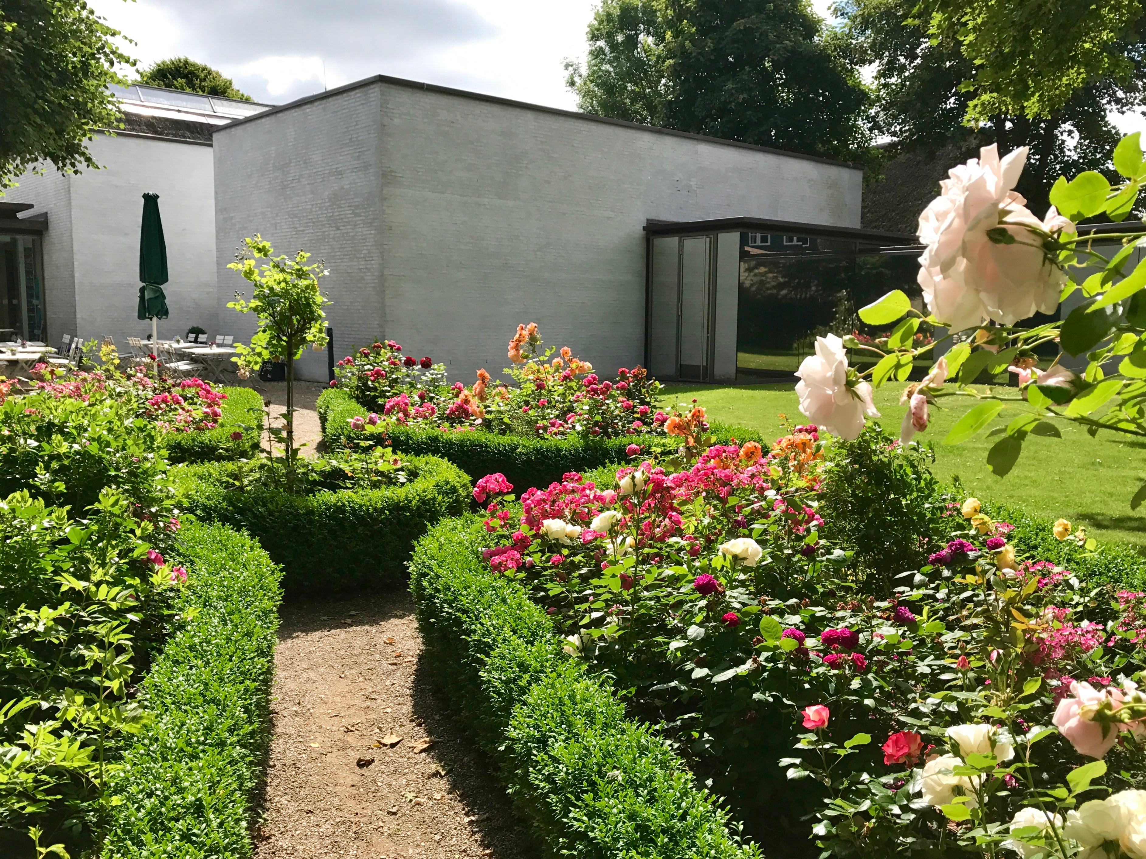 Der Innenhof des Museums Kunst der Westküste auf Föhr.